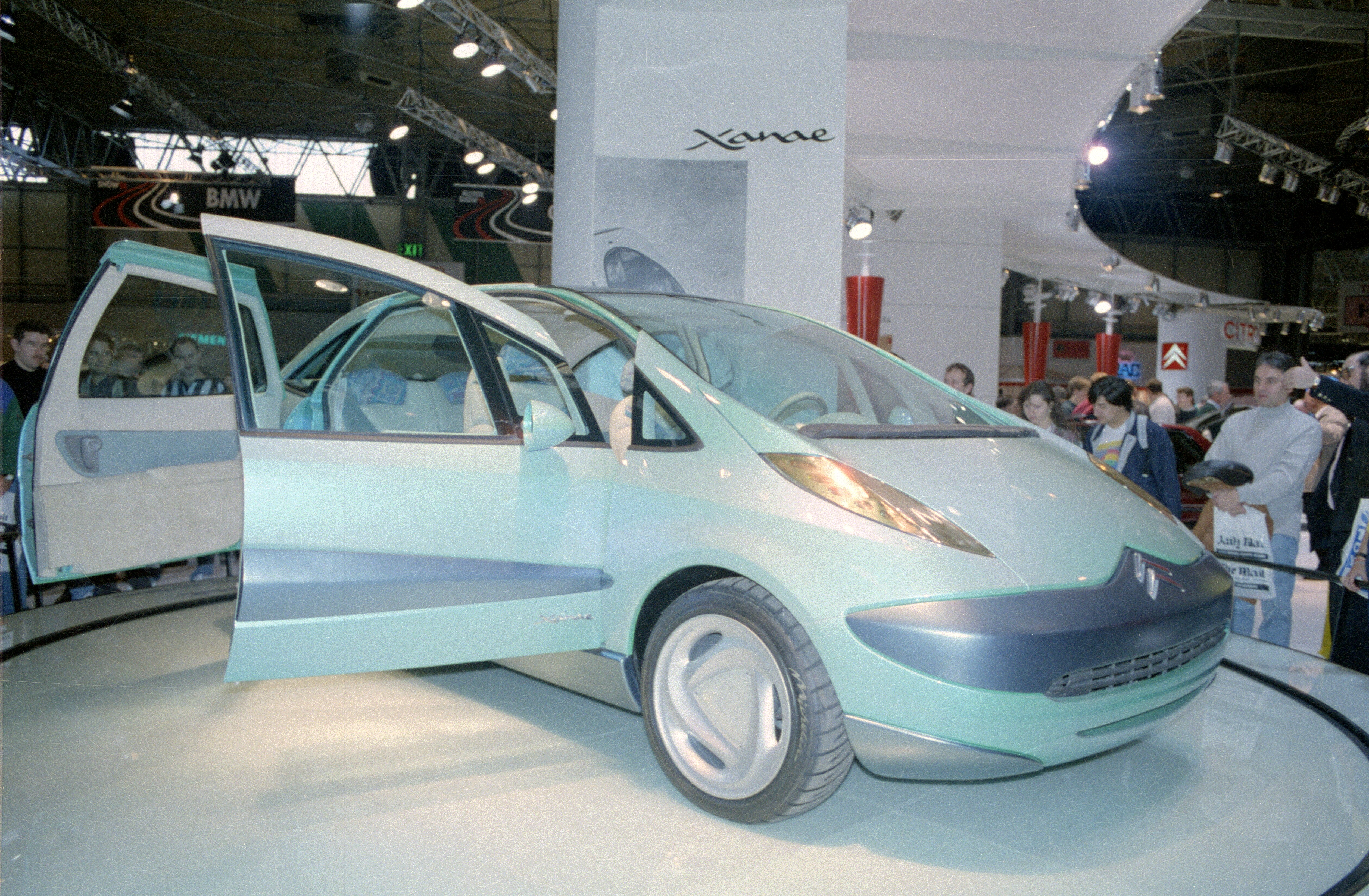 Citroen Xanae concept